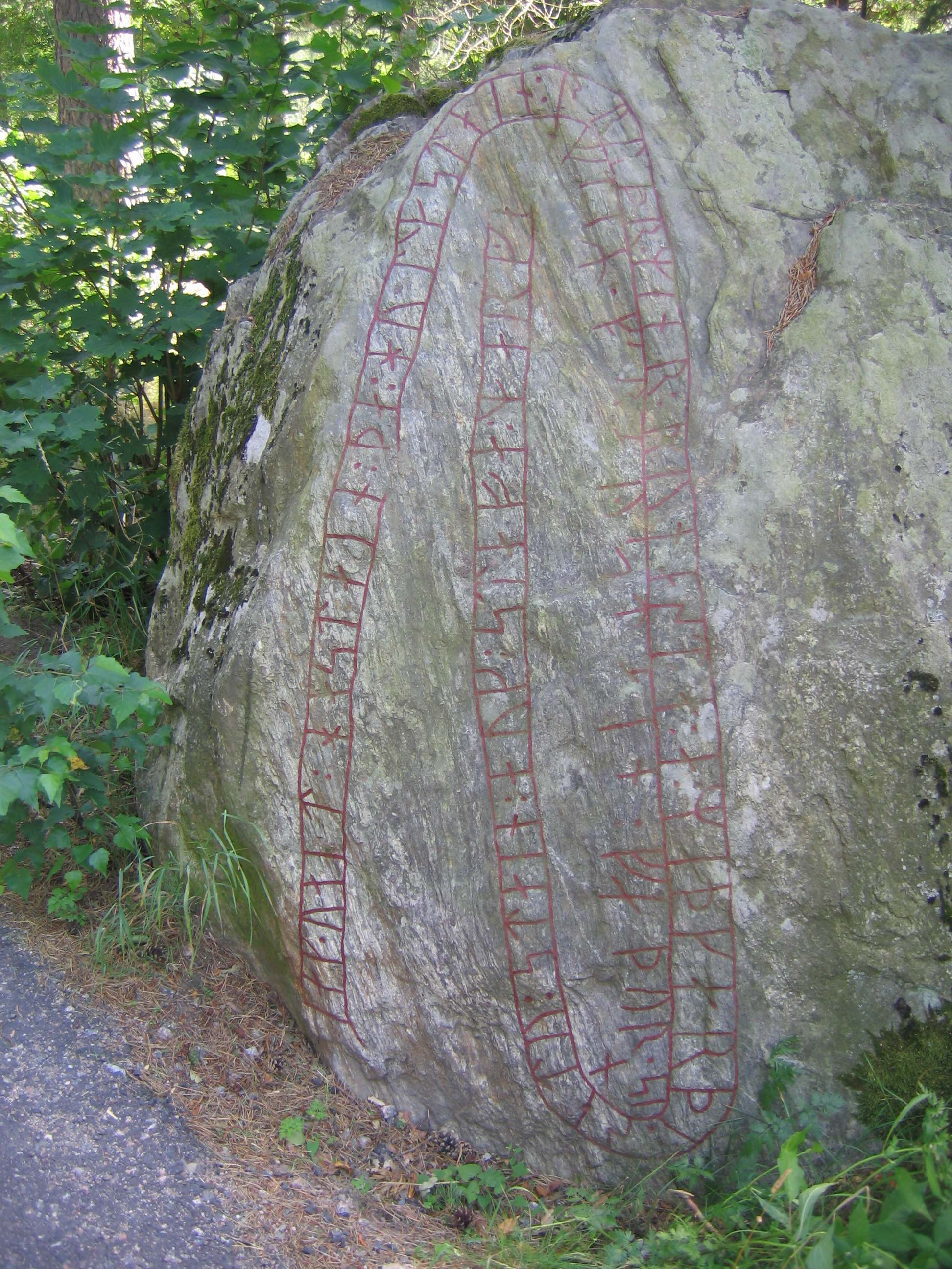 Runstenen Sö 56 i Fyrby, Blacksta, Flen.